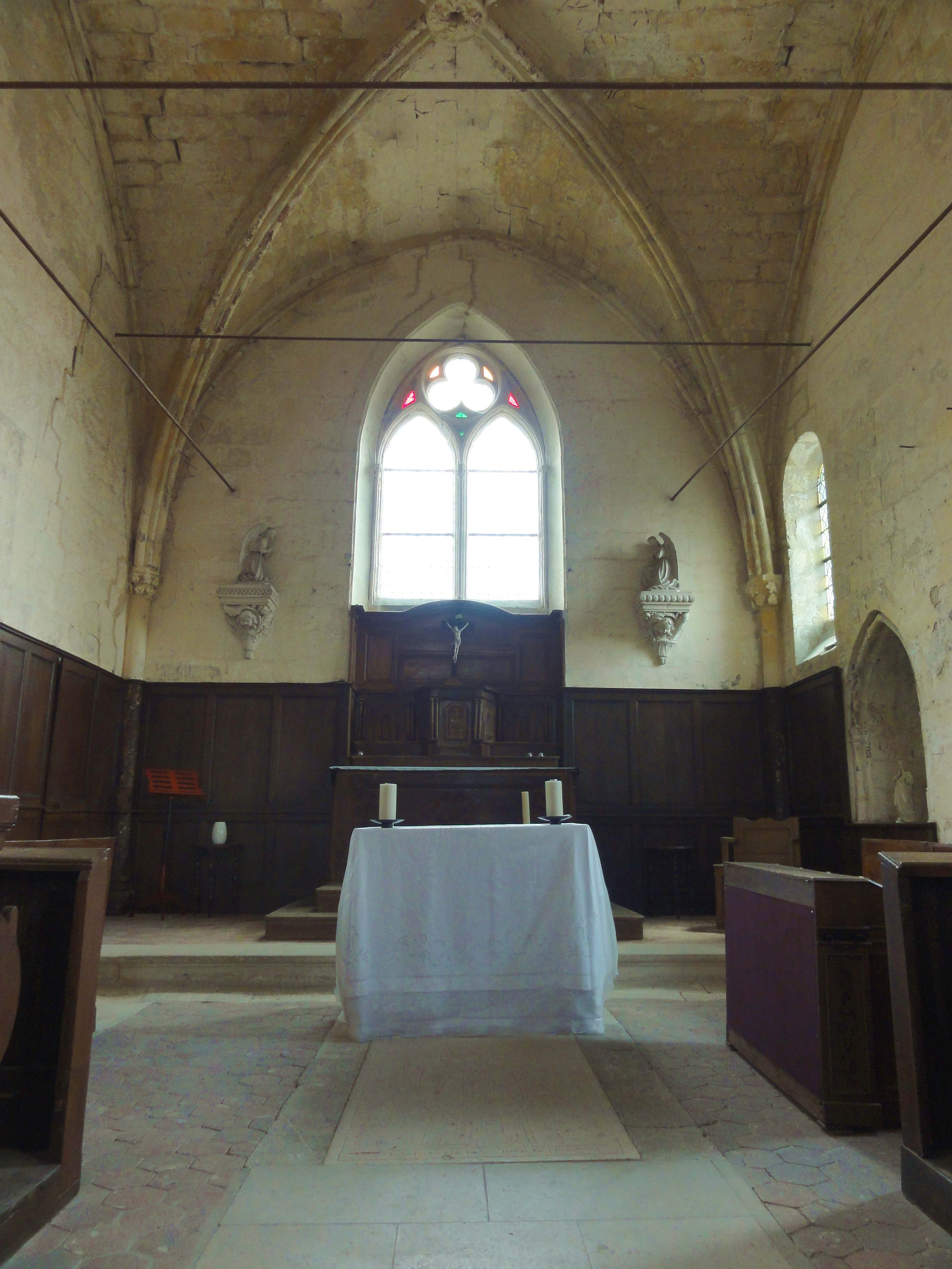 Intérieur de l'église (voir titre).